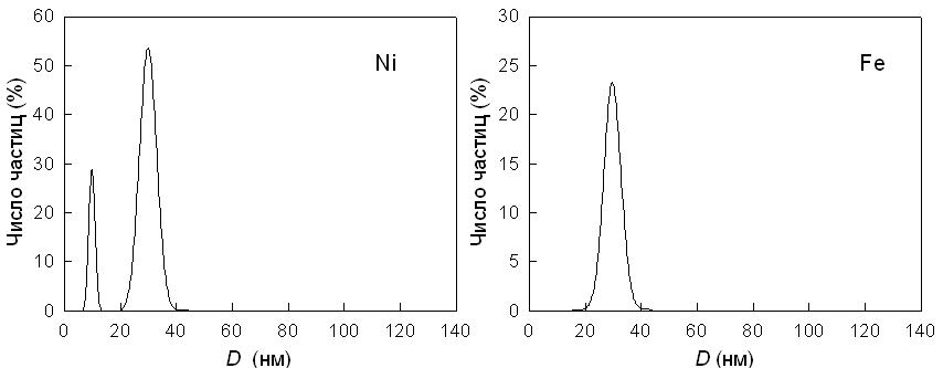 Типичное распределение по размерам металлических наночастиц, полученных восстановлением металлов из их соединений в токе водорода.// Typical size distribution of metal nanoparticles obtained by reduction of metal compounds in hydrogen.